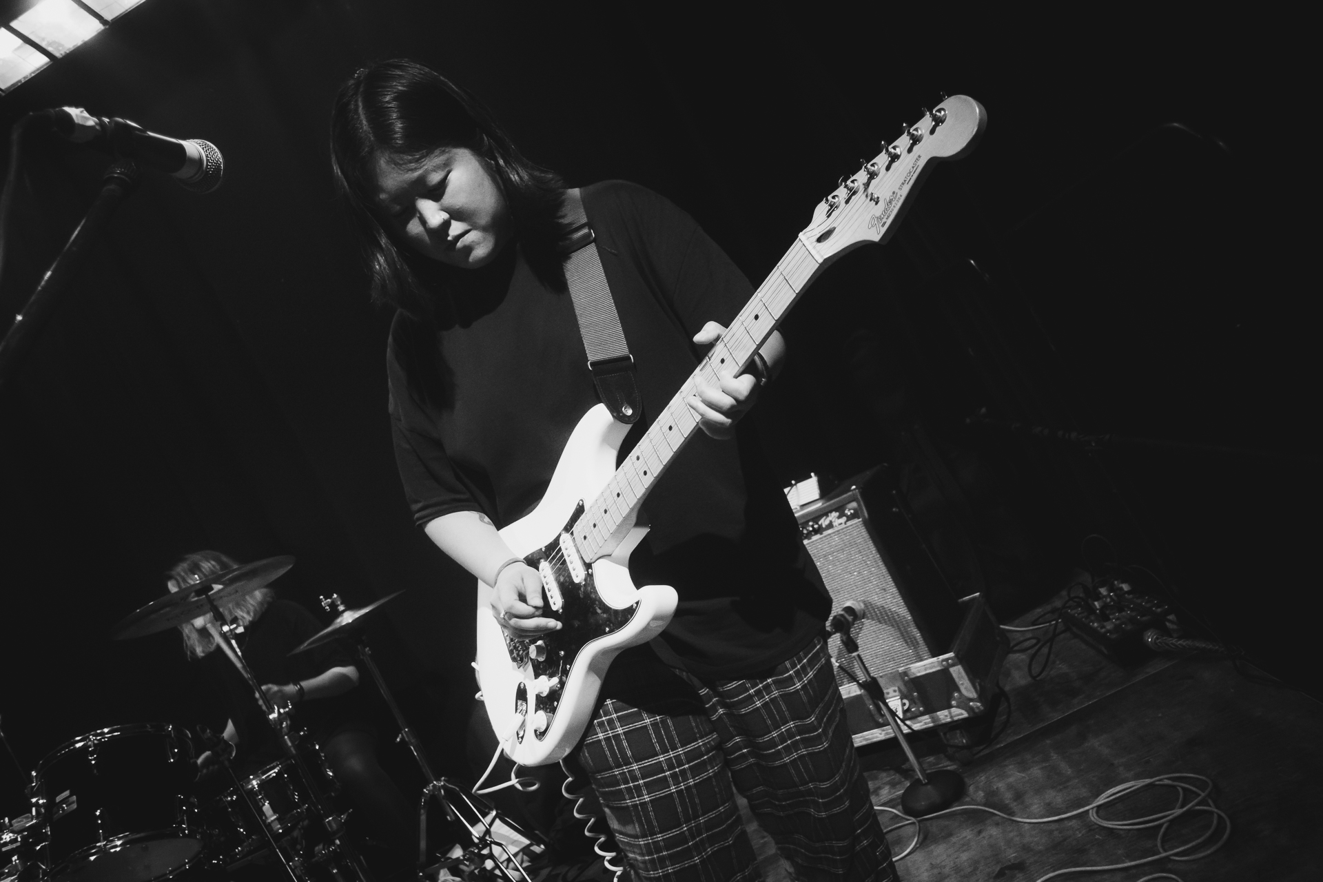 Ghum